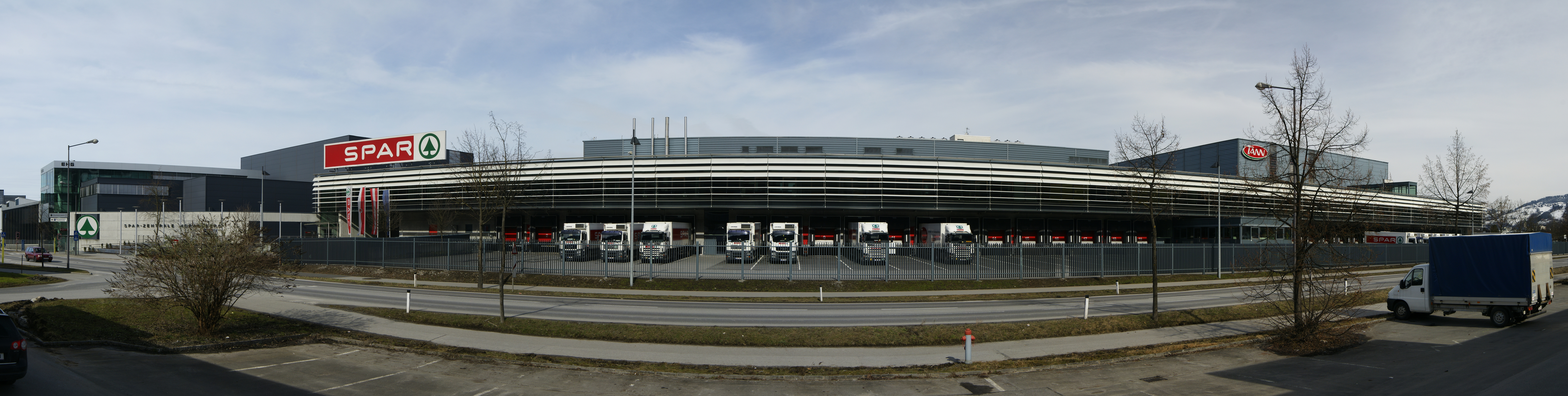 Spar (offizielle Schreibweise: SPAR) ist der weltweit größte freiwillige Zusammenschluss von Händlern zu einer Handelskette, die unter gleichem Namen und mit einheitlichem Logo auftreten, rechtlich jedoch eigenständige Gesellschaften sind (Franchise). Der Name ist ein Akronym vom niederländischen Motto (DeSpar) „Door Eendrachtig Samenwerken Profiteren Allen Regelmatig“. Im Bild die Sparzentrale Wallenmahd 46 in Dornbirn.